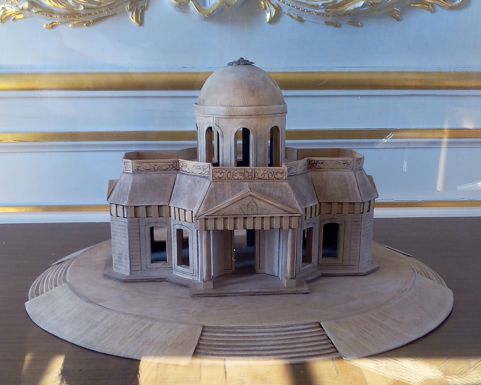 Maquette du pavillon de la duchesse du Maine, autrefois au centre du jardin de la ménagerie